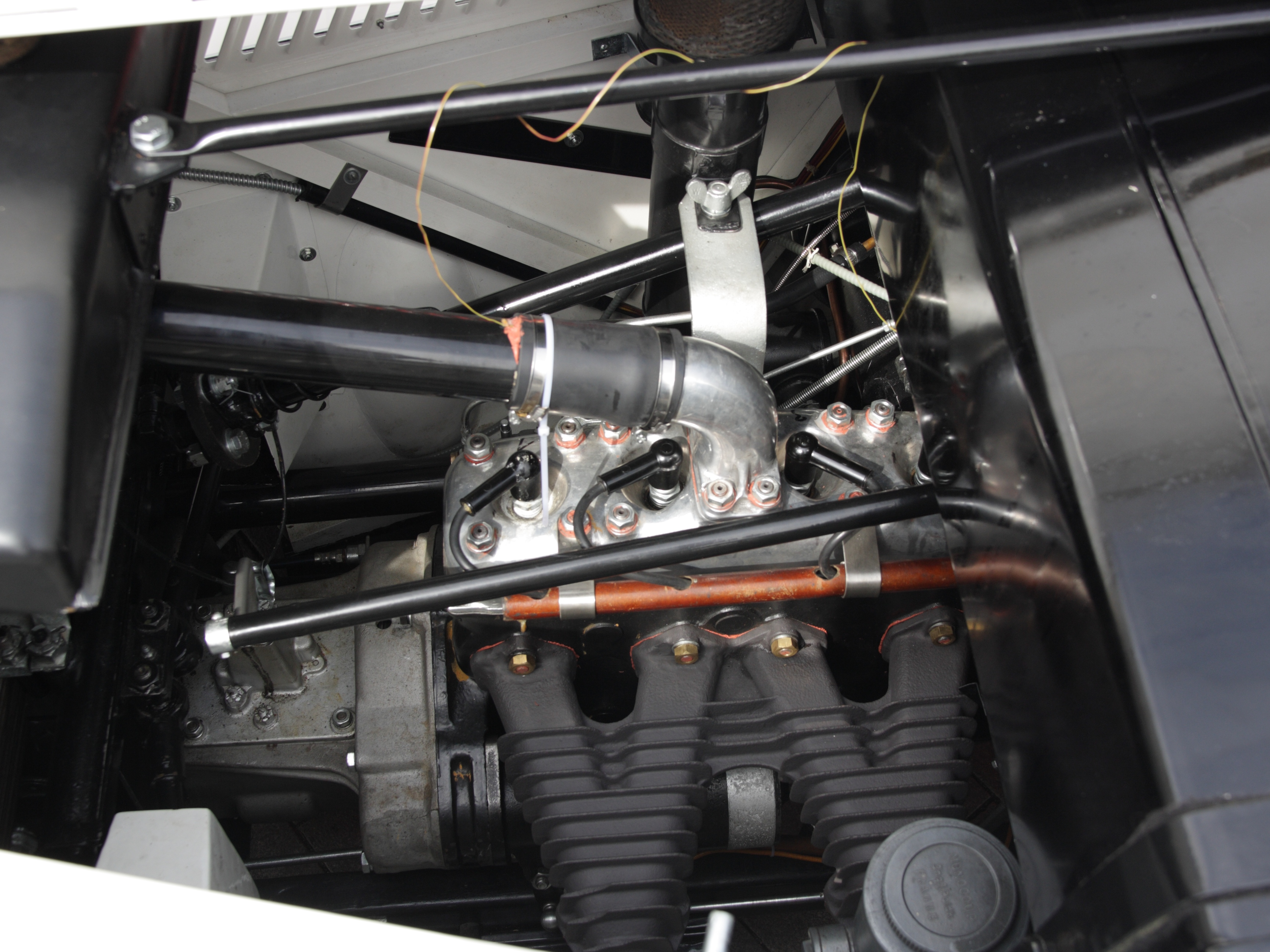 Brno, náměstí Svobody - start XXI. Srazu historických vozidel Vysočina 2014. Z 5 Expres.